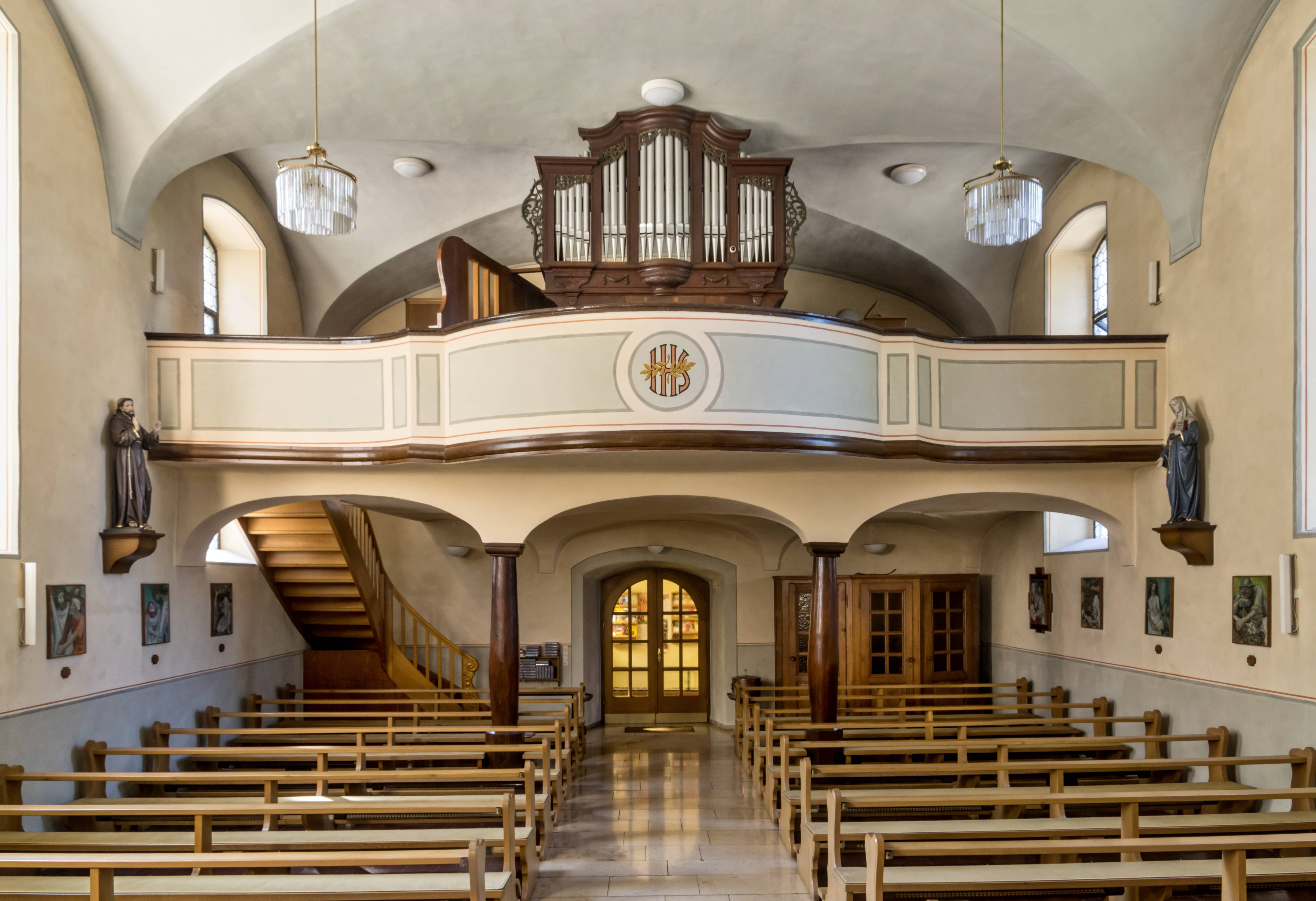 St Vitus in Wettlebrunn eine Teilort von Staufen Blick vom Chor zum Haupteingang